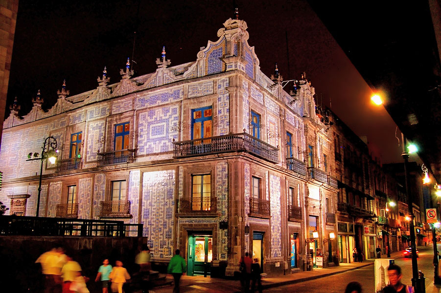 "Casa de los azulejos", Sanborns del Centro Histórico